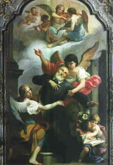 Estasi di San Filippo Neri, dipinto di Giuseppe Peroni nella Basilica di Santa Maria presso San Satiro (Milano).